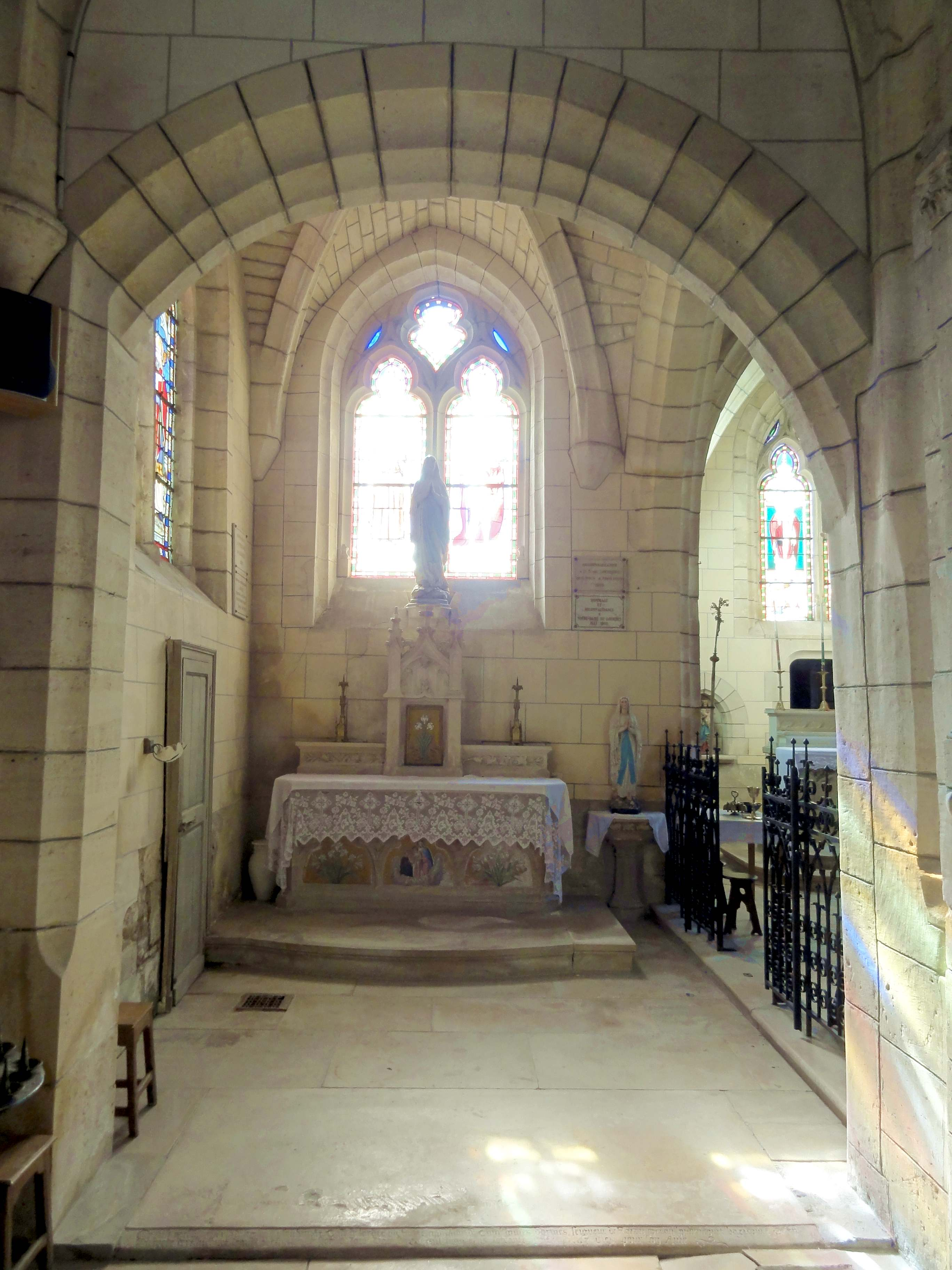 Intérieur de l'église (voir titre).